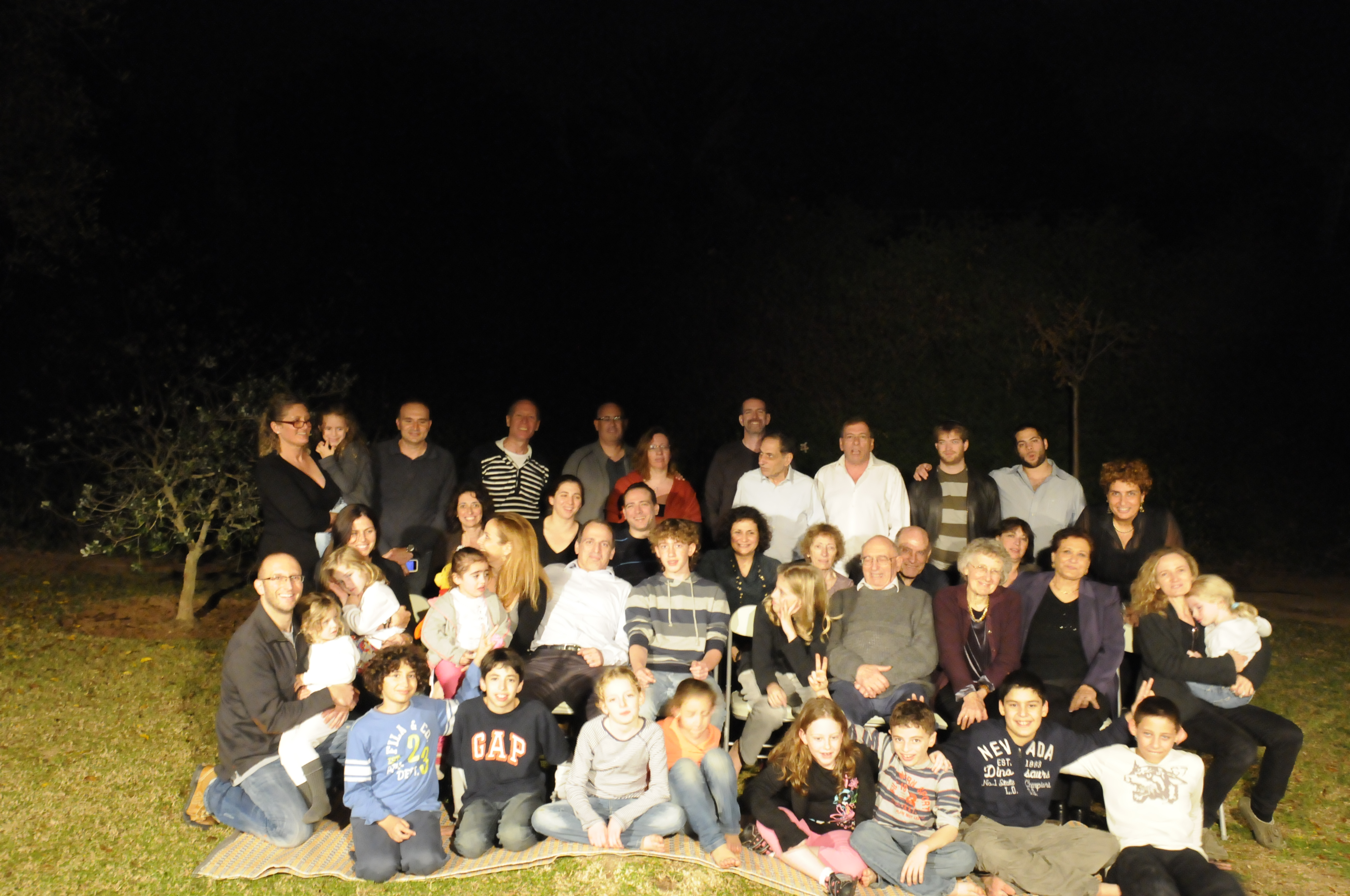 חיים זכות עם משפחתו